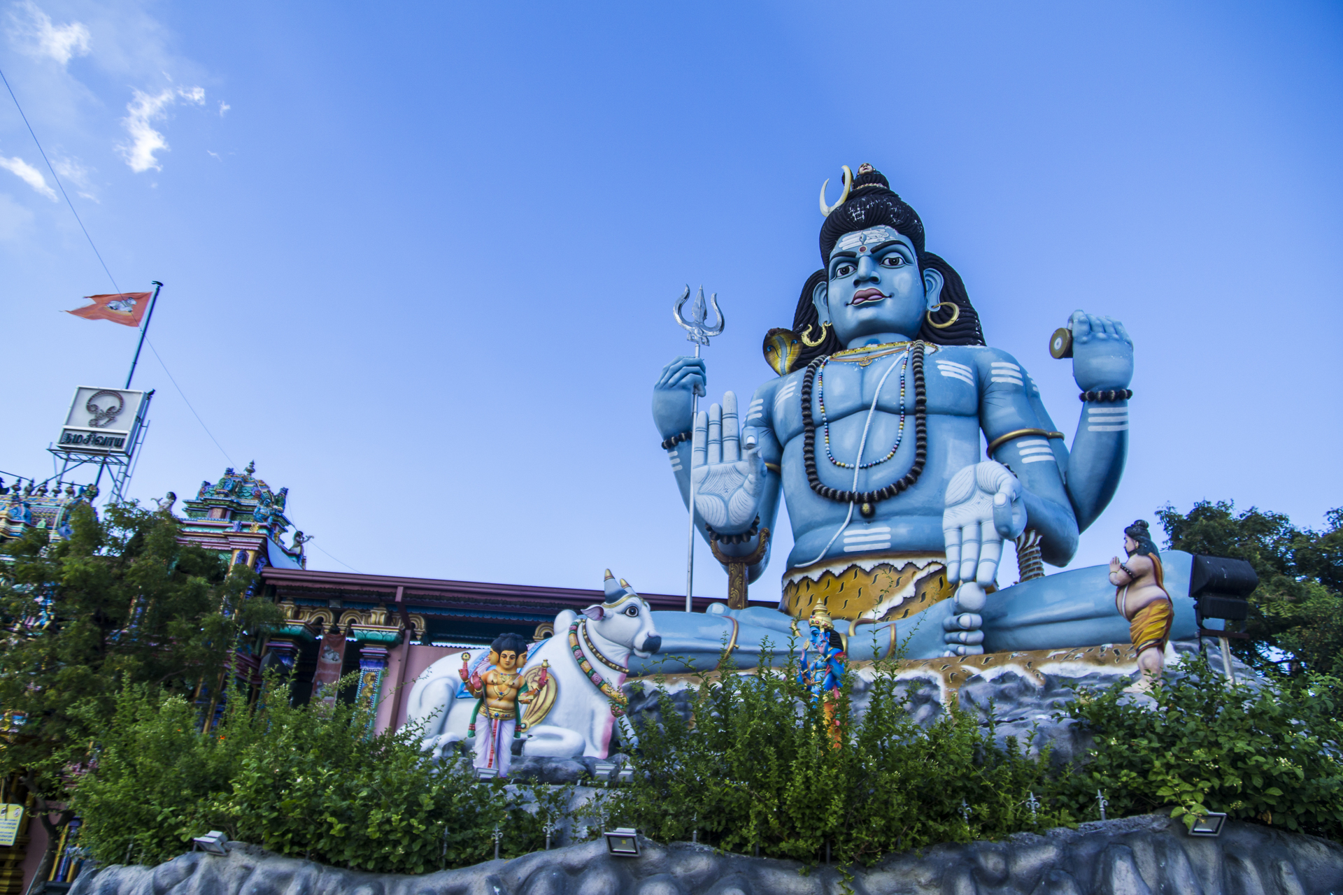 bei Tricomalee auf Sri Lanka.